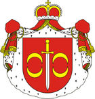 Druck Clan